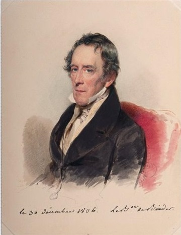 Moritz Daffinger